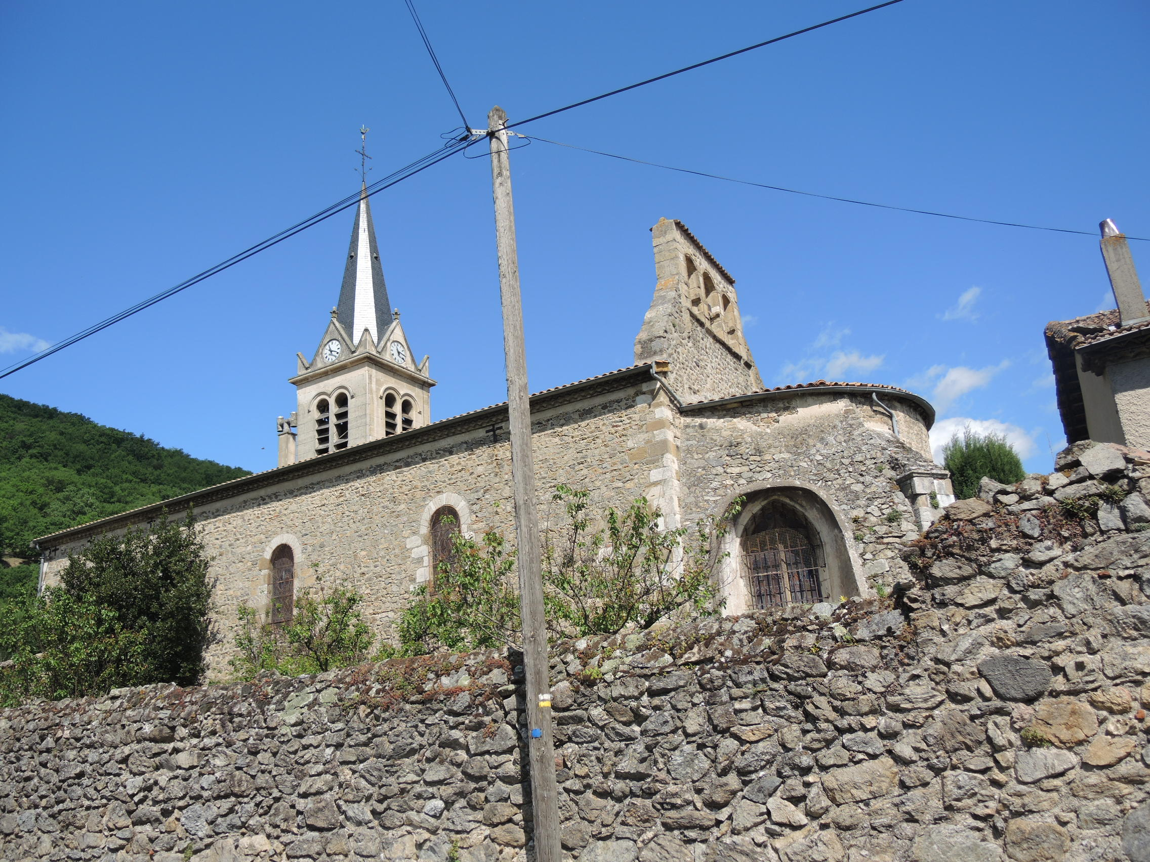 Peyraud détail